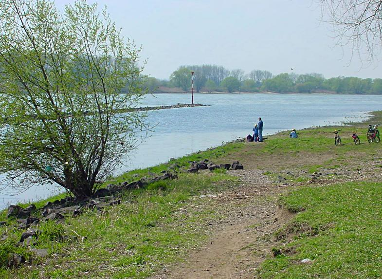 Beschreibung: Wuppermündung in Rheindorf - Rhein-Stromkilometer 703 Quelle: fotografiert am 12. April 2004 Fotograf: Michael Tettinger, Solingen Andere Versionen: Lizenzstatus: GNU FDL